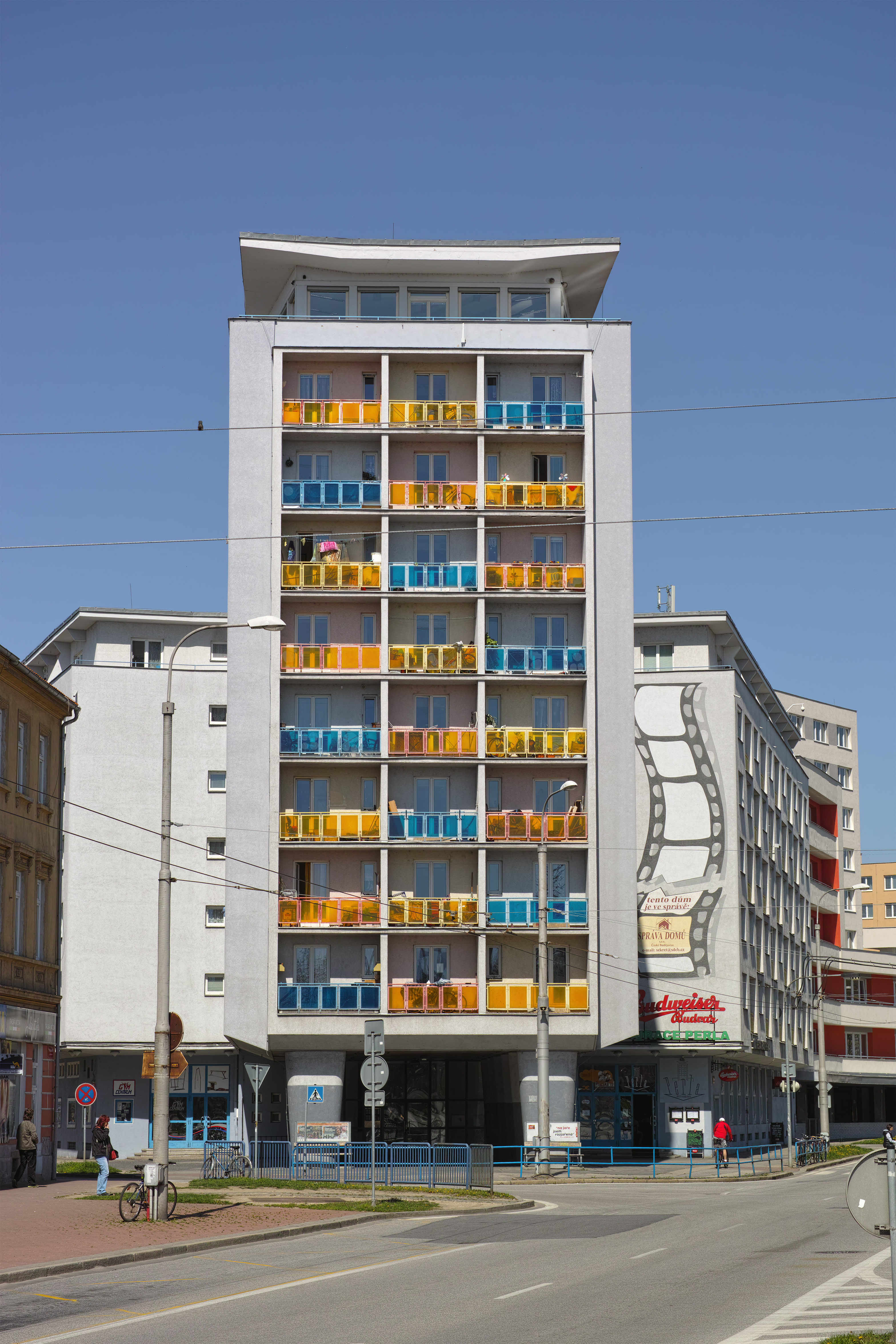 Koldům, komplex činžovních domů Perla, České Budějovice